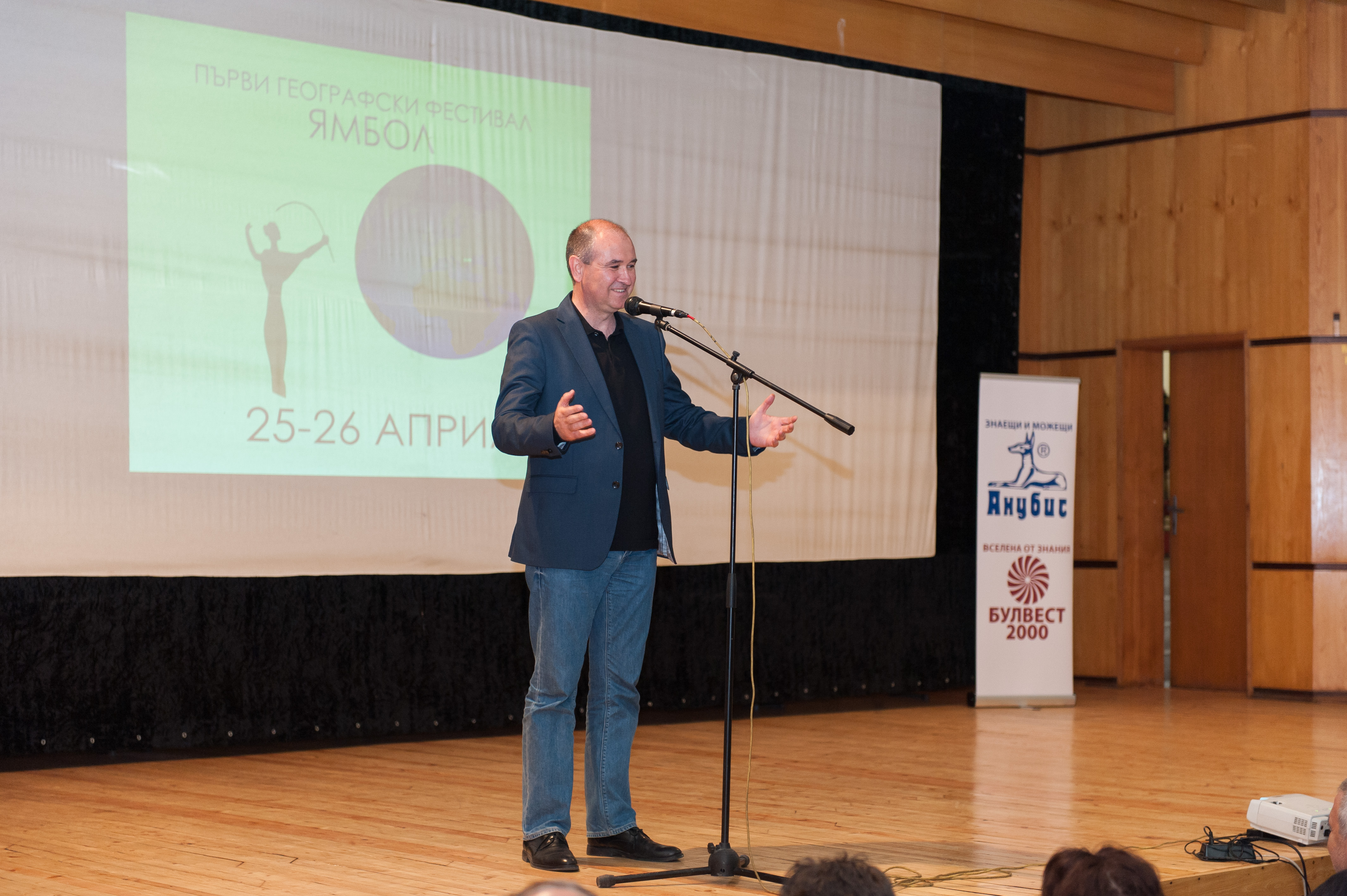 Кметът на община Ямбол Георги Славов открива Първия географски фестивал - Ямбол 2015